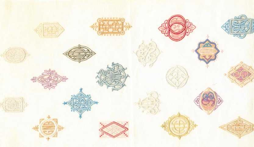 Echantillonage de chiffres brodés, musée de Fontenoy-le-Château